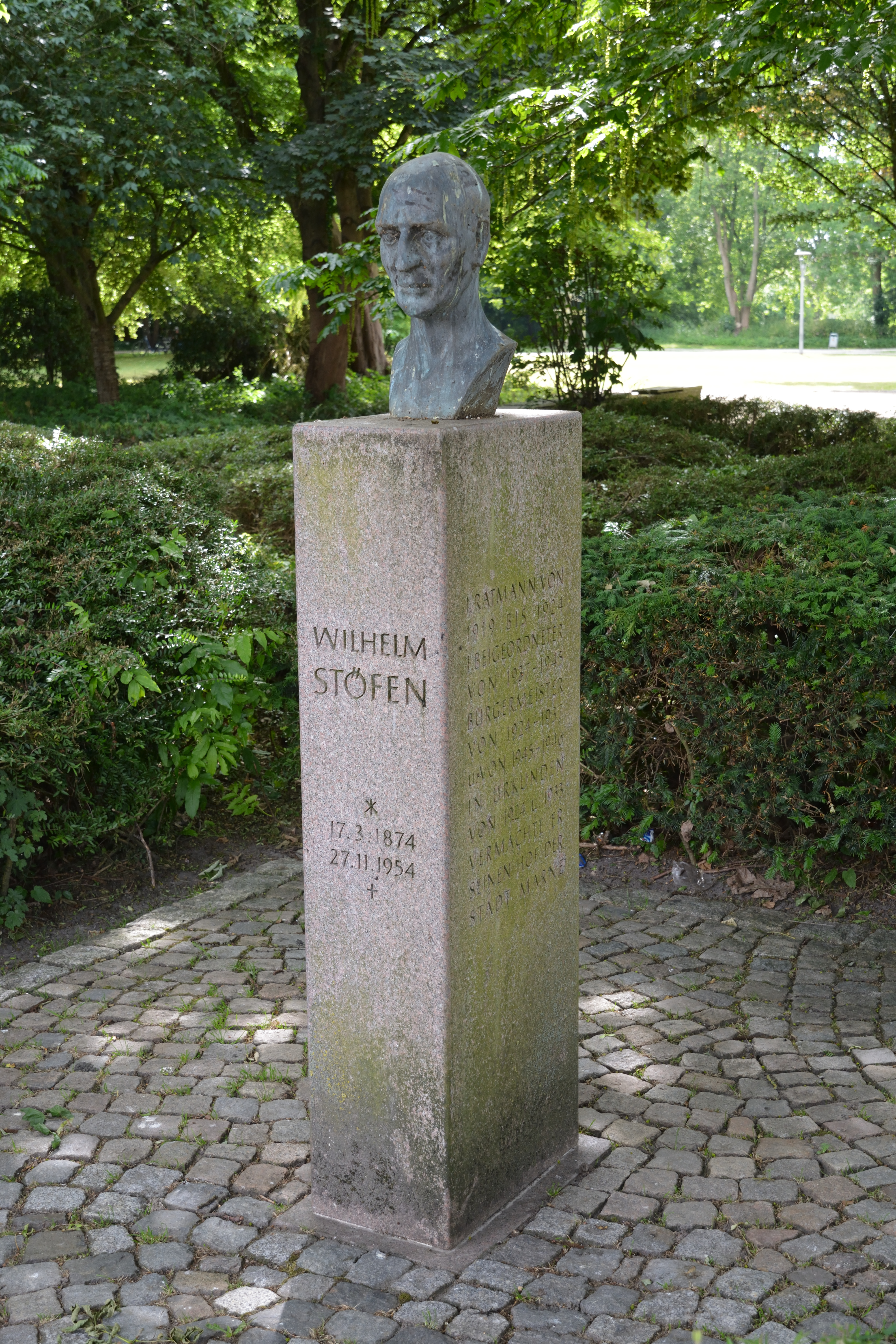 Impressionen aus Marne Denkmal für für den ehemaligen Bürgermeister Wilhelm Stöfen, am gleichnamigen Park.